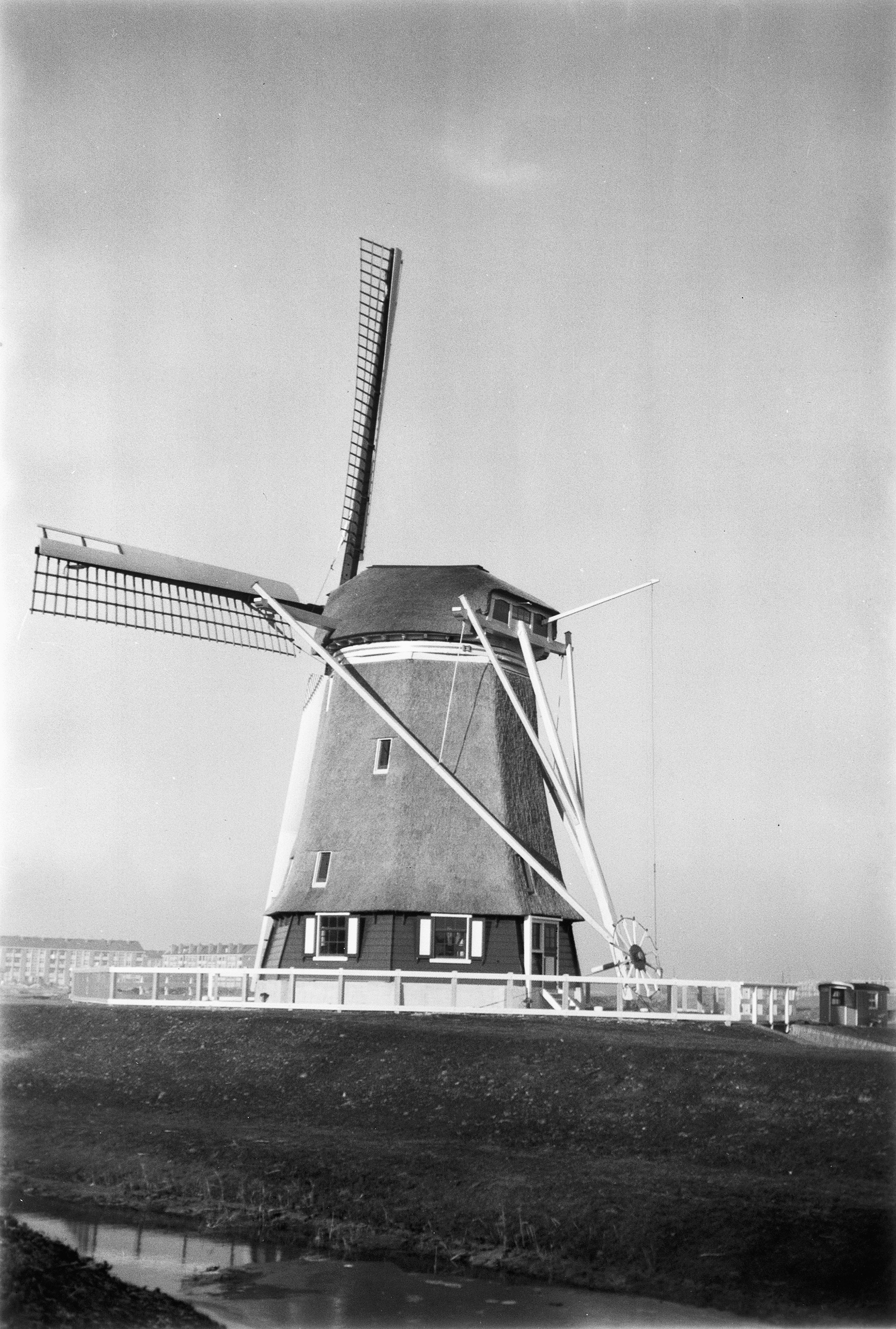 Ten-Bruggencatenummer: 12193: "Rickermolen" na voltooiing